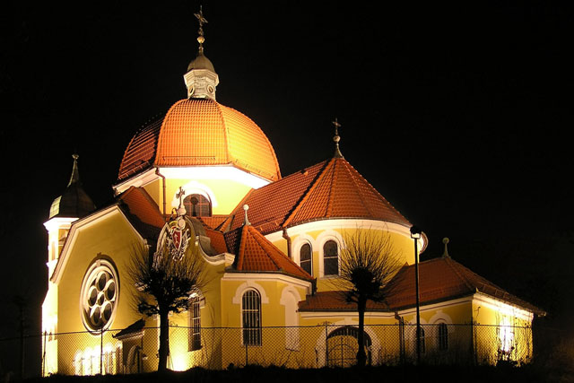 Nekielski kościół nocą